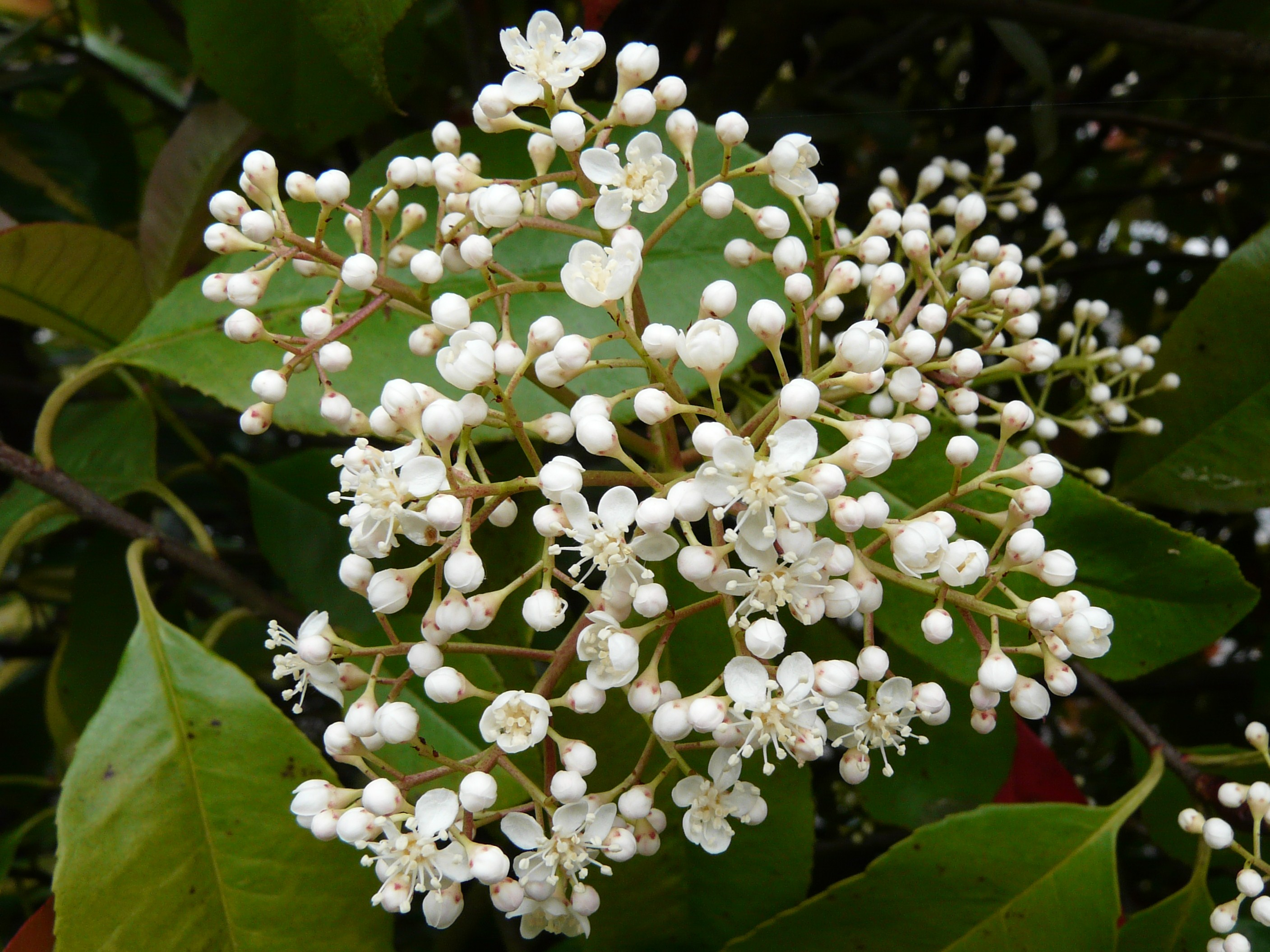 Début de floraison d'un Photinia x fraseri, Dordogne, France.